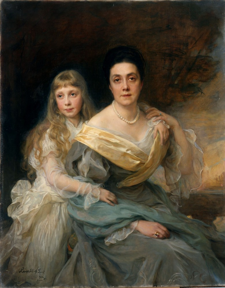 Надежда Алексеевна Капнист, ур. графиня Стенбок-Фермор (1864—1947) с дочерью Маргаритой (1891—1973), в замужестве за князем Георгием Павловичем Кантакузеным.